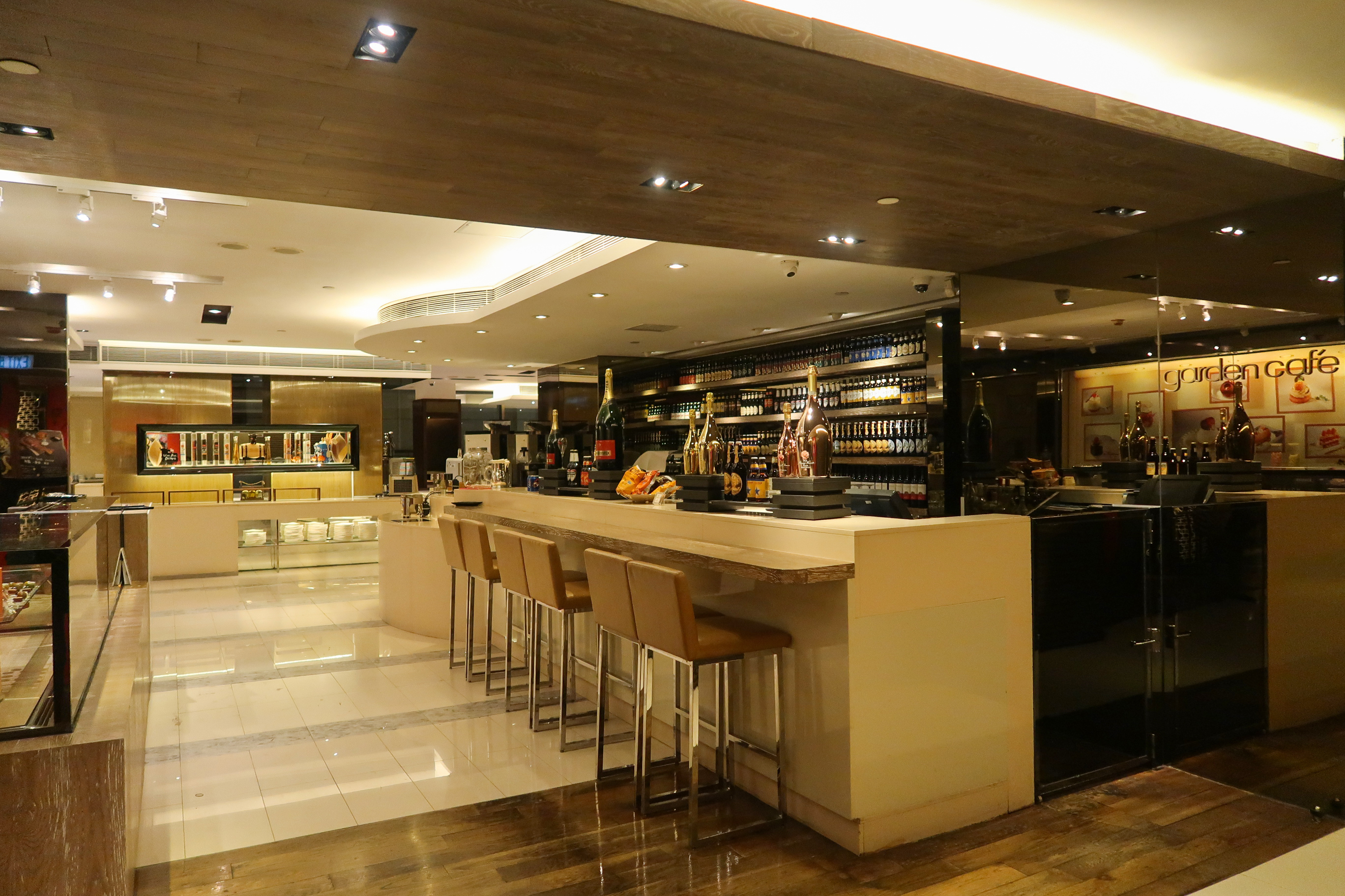 City Garden Hotel Garden cafe